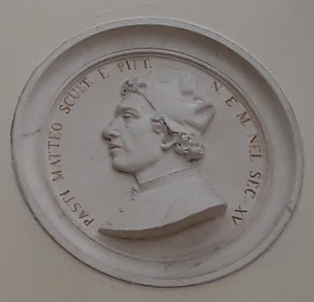 Raffigurazione di Matteo Pasti